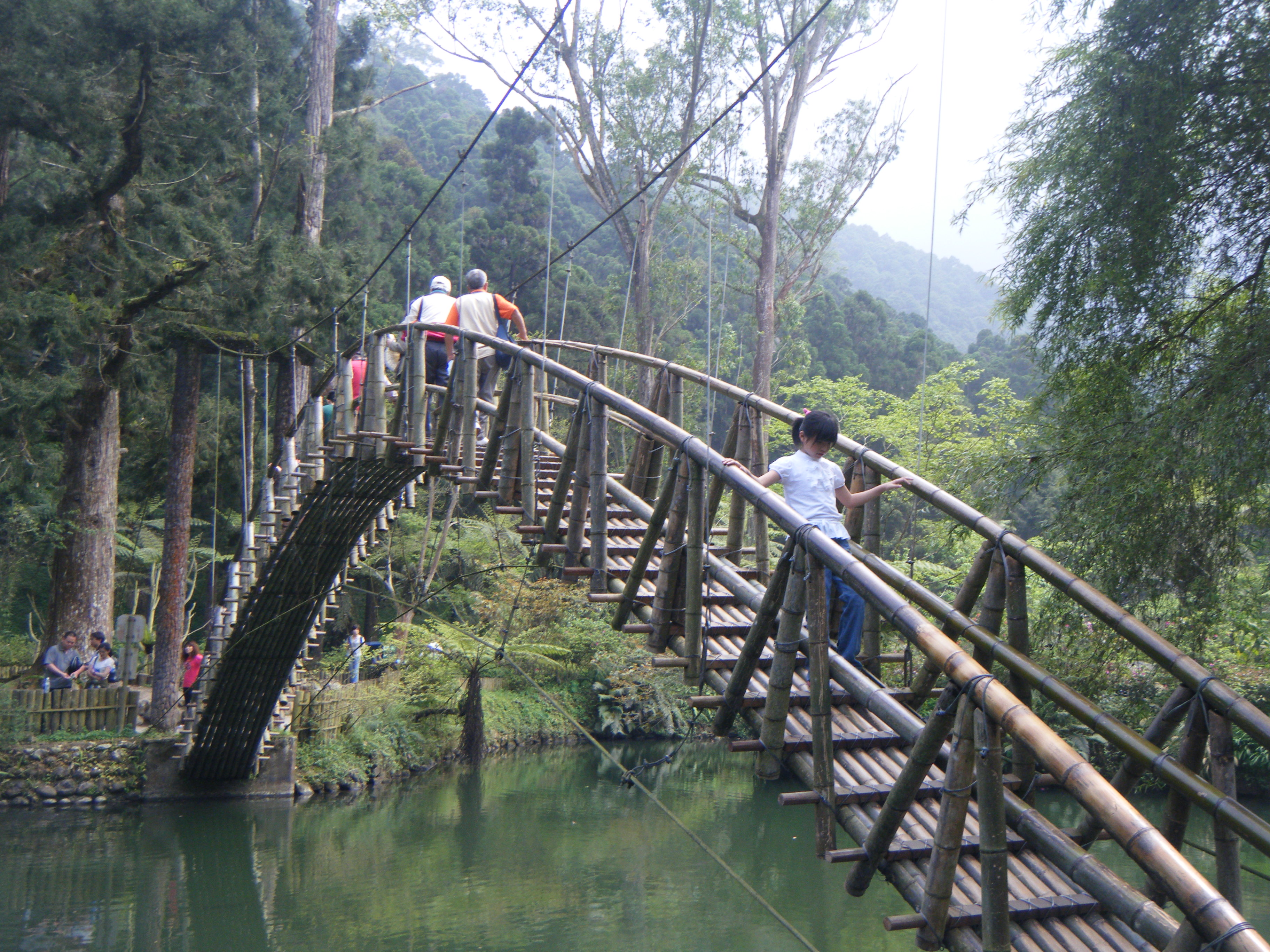 溪頭的大學池